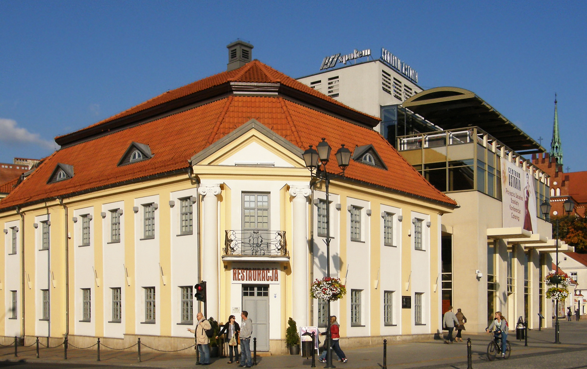 Białystok, ul. Sienkiewicza 4 - dom, obecnie Centrum "Astoria": restauracja, pub, bar (zabytek nr A-219 z 11.03.1957)